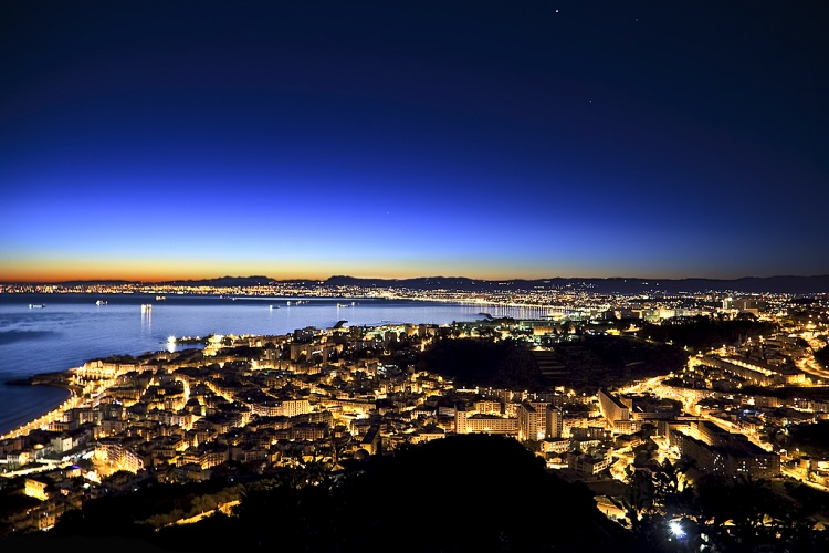 La ville d'Alger aux premières lueurs de l'aube.